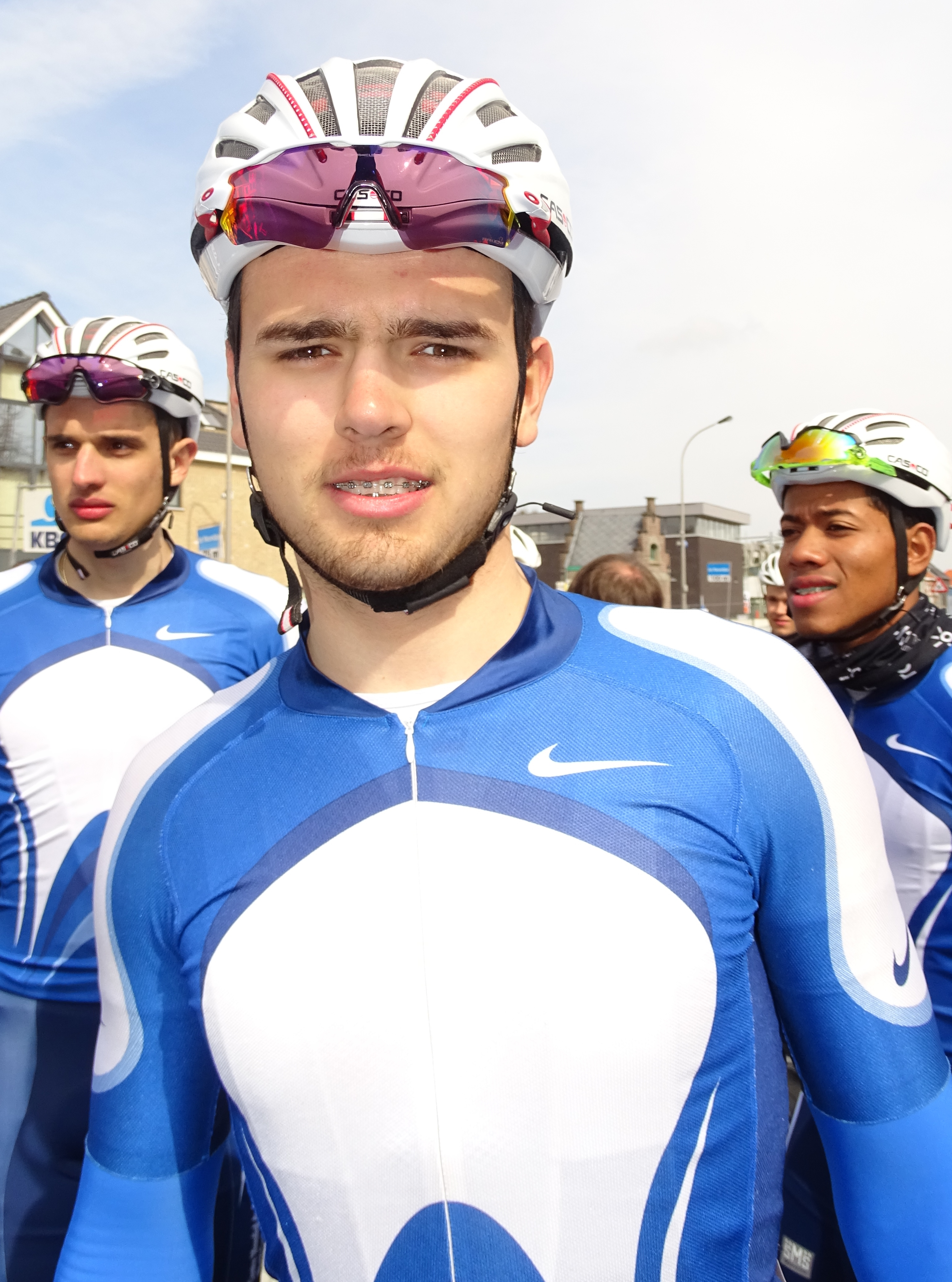 Reportage réalisé le samedi 9 avril à l'occasion du départ et de l'arrivée du Tour des Flandres espoirs 2016 à Audenarde, Belgique.